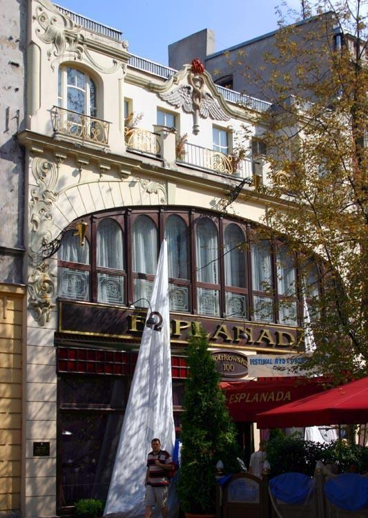 Ulica Piotrkowska, Łódź